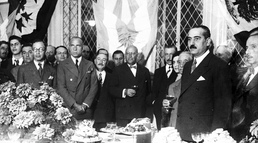 El sr. Moisés J. Azize y el presidente de la Nación, Gral. Agustín P. Justo en el agasajo ofrecido con motivo de la inauguración del Colegio. En el fondo, las banderas de Siria, Argentina y Líbano.